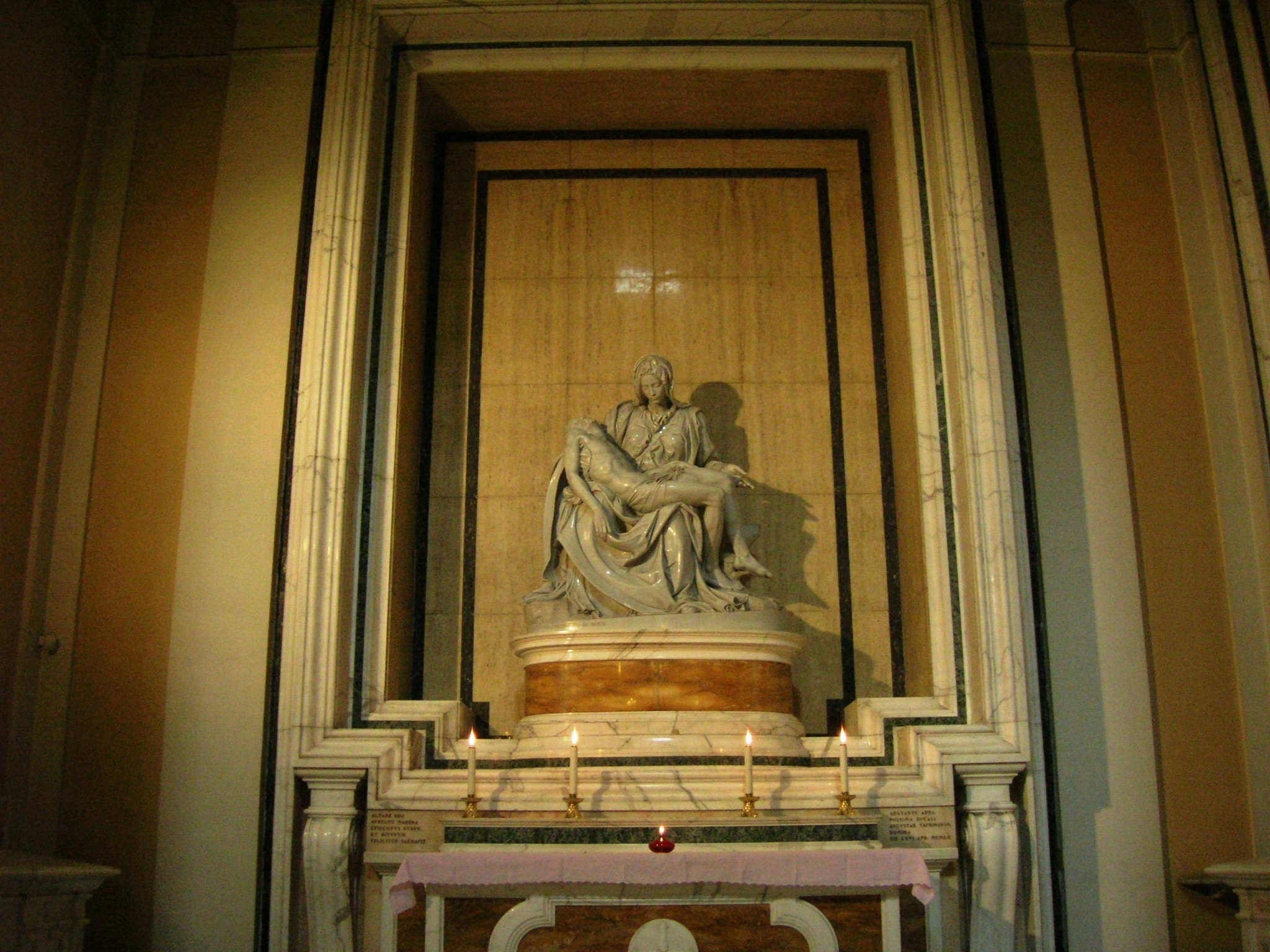 Basilica dell'Incoronata Madre del Buon Consiglio